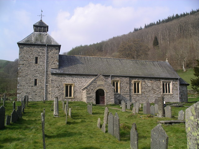 Pennant Melangell